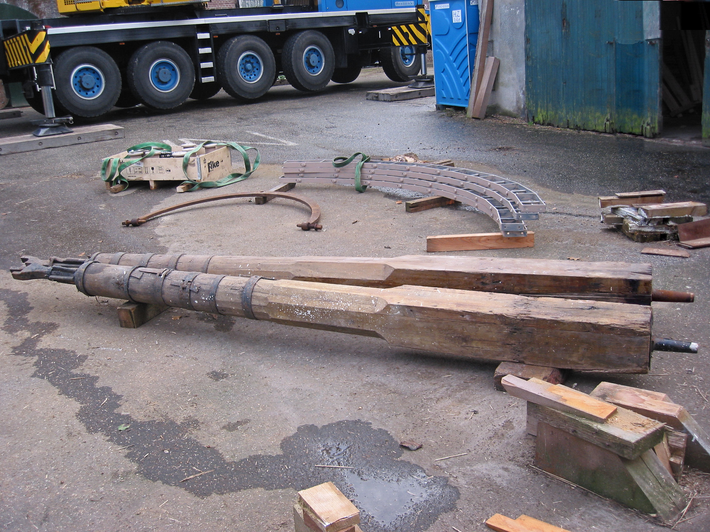 Steenspillen van de Concordia molen te Ede 20 November 2007